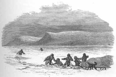 Payer a tengernél